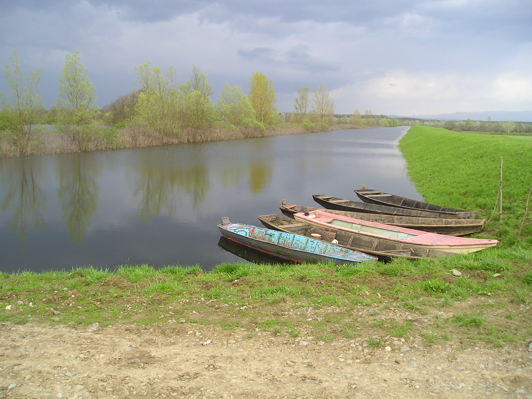 Panonsko more